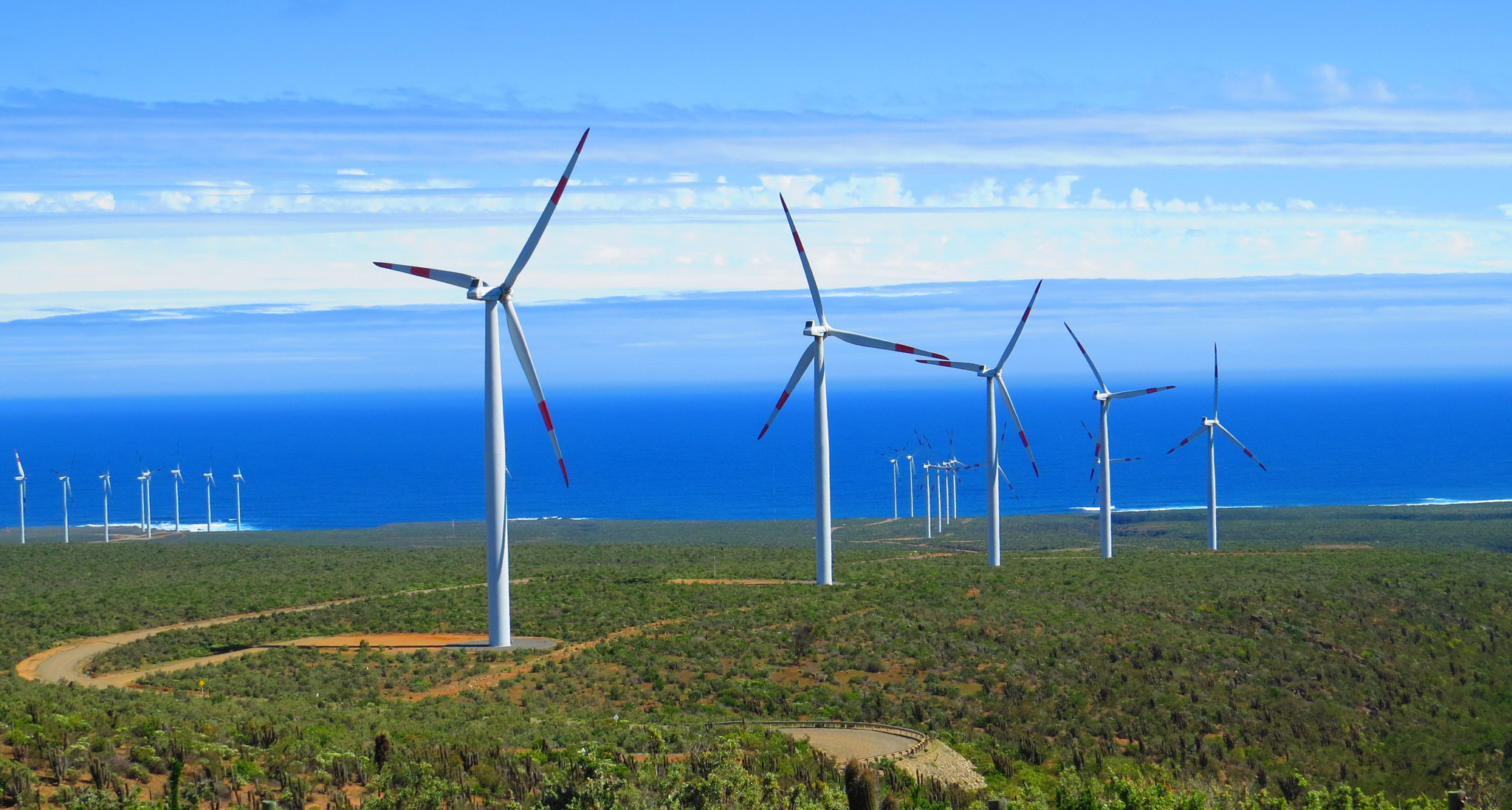 500px provided description: Parque eolico de canela frente al mar [#Canela ,#Parque Eolico ,#Norte chile]